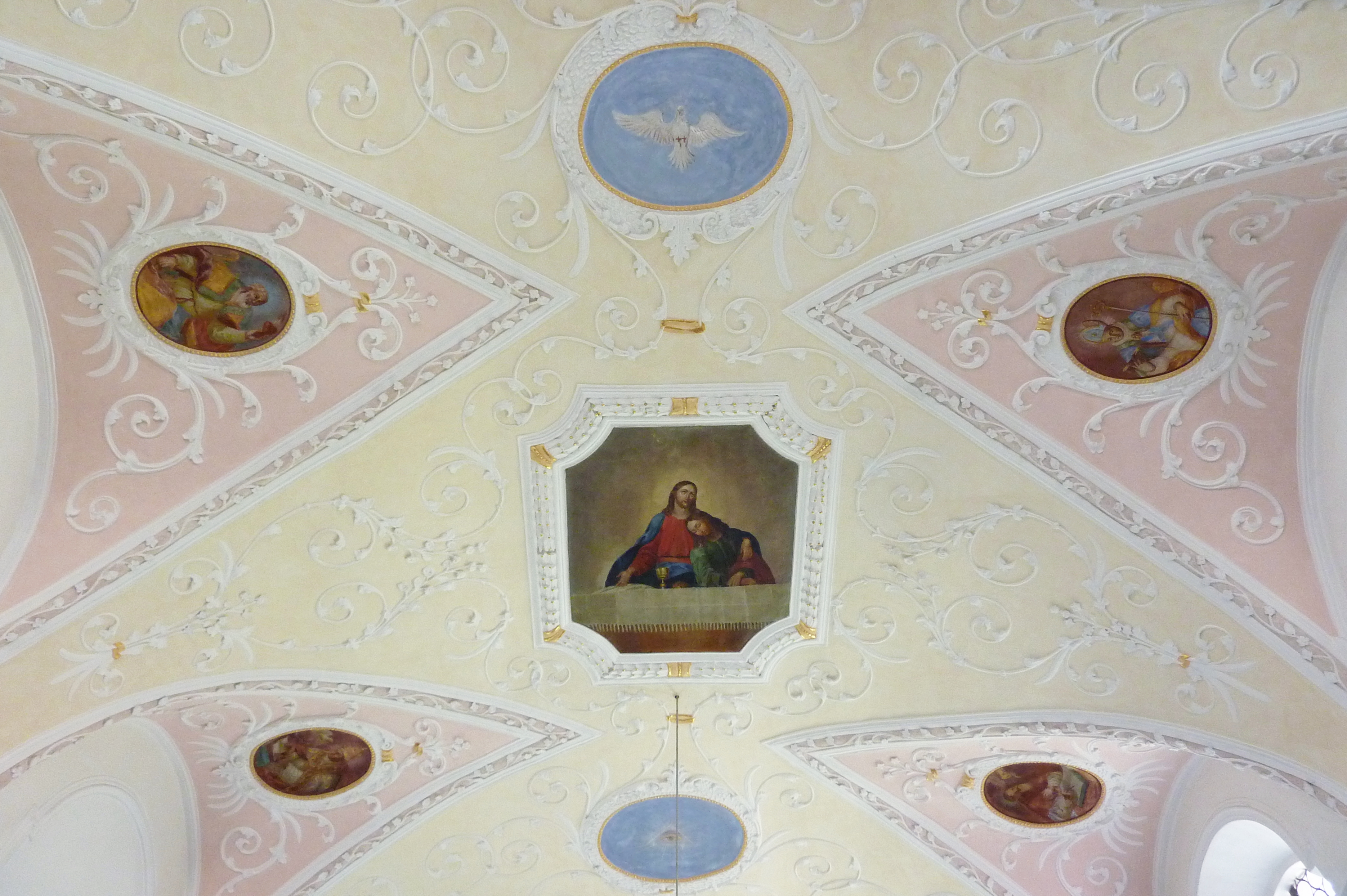 Katholische Pfarrkirche St. Peter und Paul in Ried (Jettingen-Scheppach) im Landkreis Günzburg (Bayern), Stuck und Deckenmalerei im Chor von 1710/20, Darstellung: Jesus und der Apostel Johannes (Mitte), Kirchenlehrer (seitlich), Taube des Heiligen Geistes (oben) und Auge Gottes (unten)